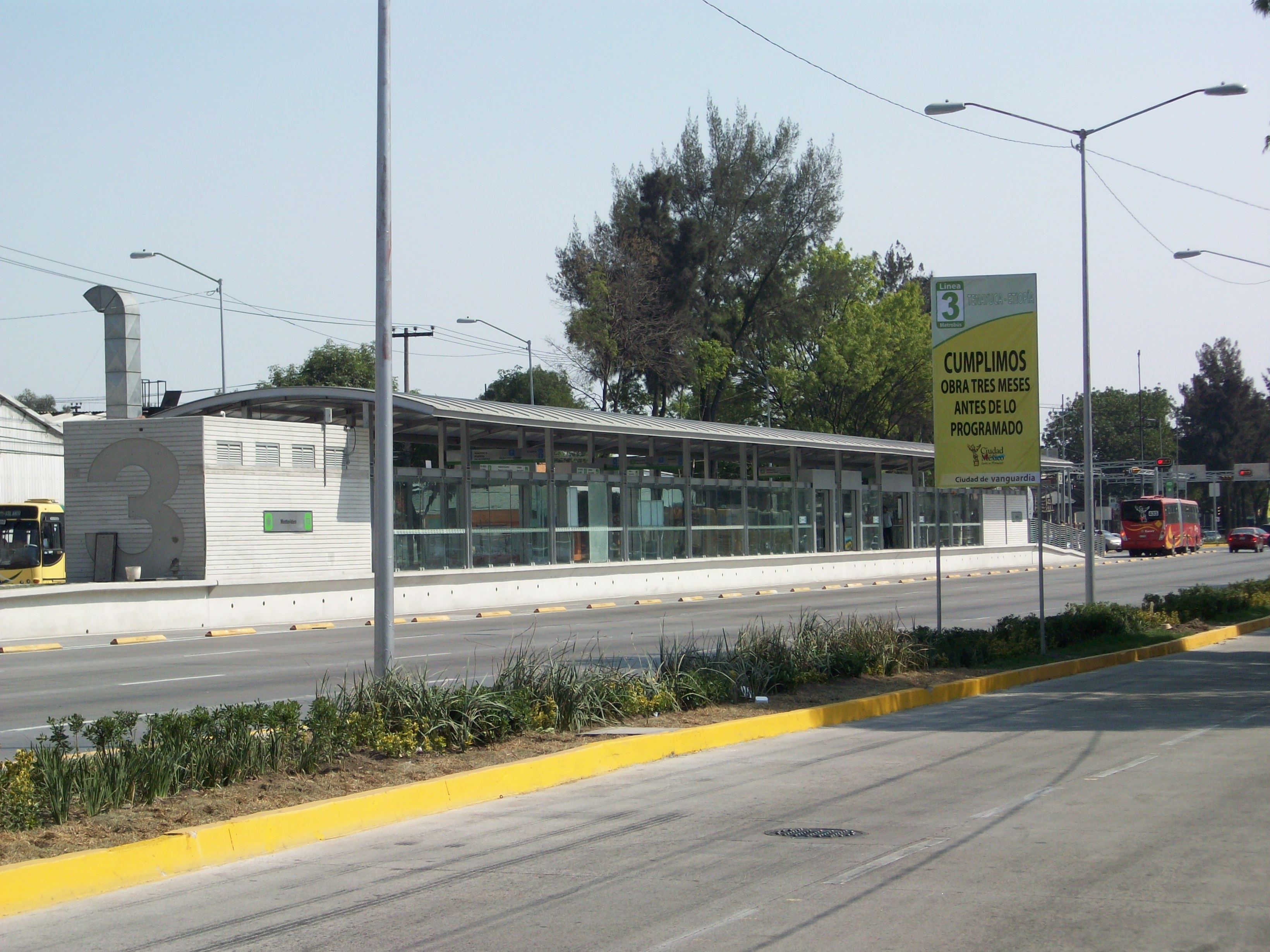 Estacion Montevideo atras